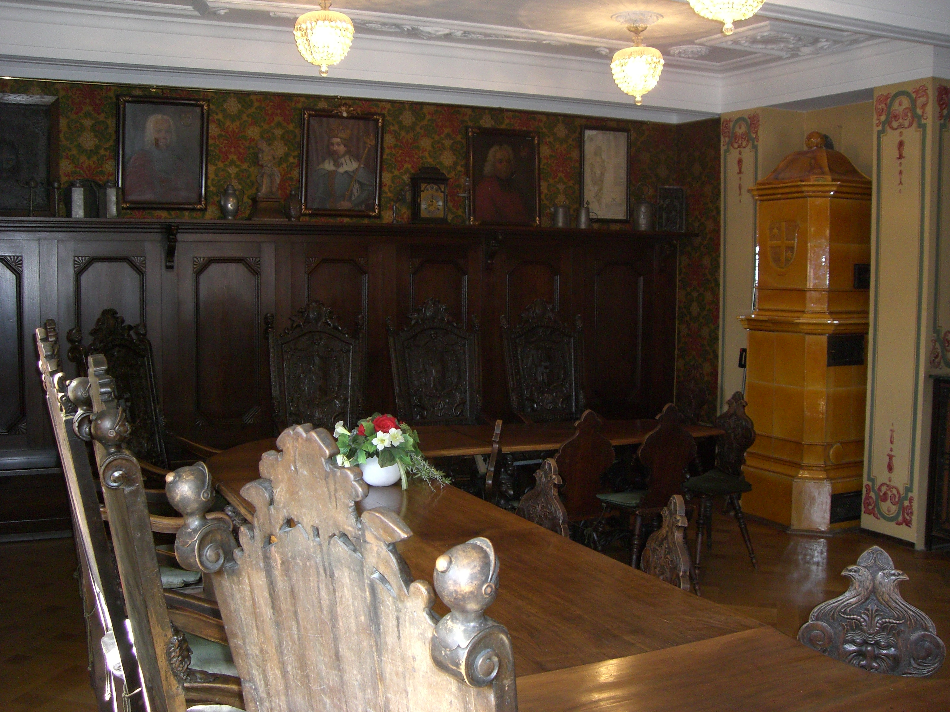 Der Raatssal im historischen Rathaus Deidesheims, 1912 in seiner heutigen Form hergerichtet